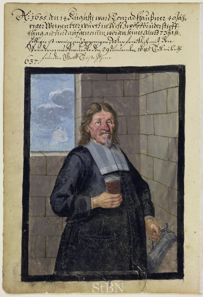 Conrad (Conrad; Konrad) Haußnerr (Hausne), Weitzenbier Würth (Bierwirt; Wirt) Transkription und weitere Informationen